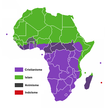 Occitanizacion d'un document inicialament creat per Moshin (nom : Religion_distribution.png) puei modificat per T L Miles (nom :Religion distribution Africa crop.png). Reparticion dei religions en Africa.